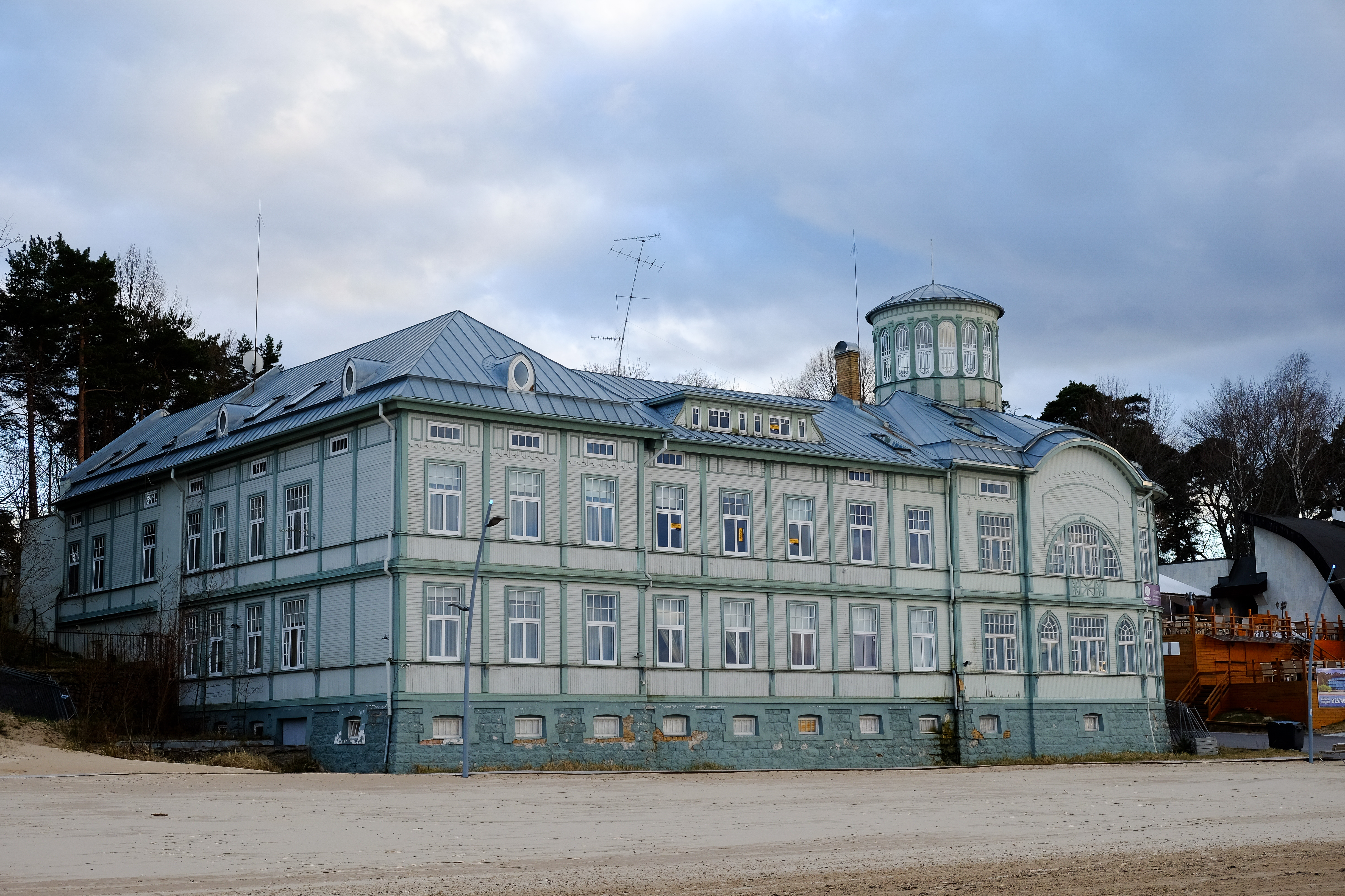 Rāceņa peldu iestāde, Jūrmala, Pilsoņu iela 1